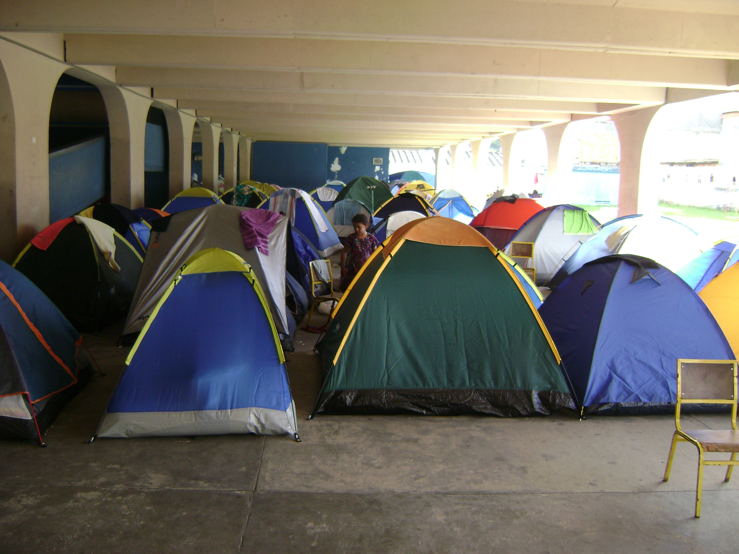 Barracas de estudantes que estão alojados dentro da UFF (em Niterói) para participarem do XXVII Encontro Nacional dos Estudantes de Filosofia (ENEFIL 2011).